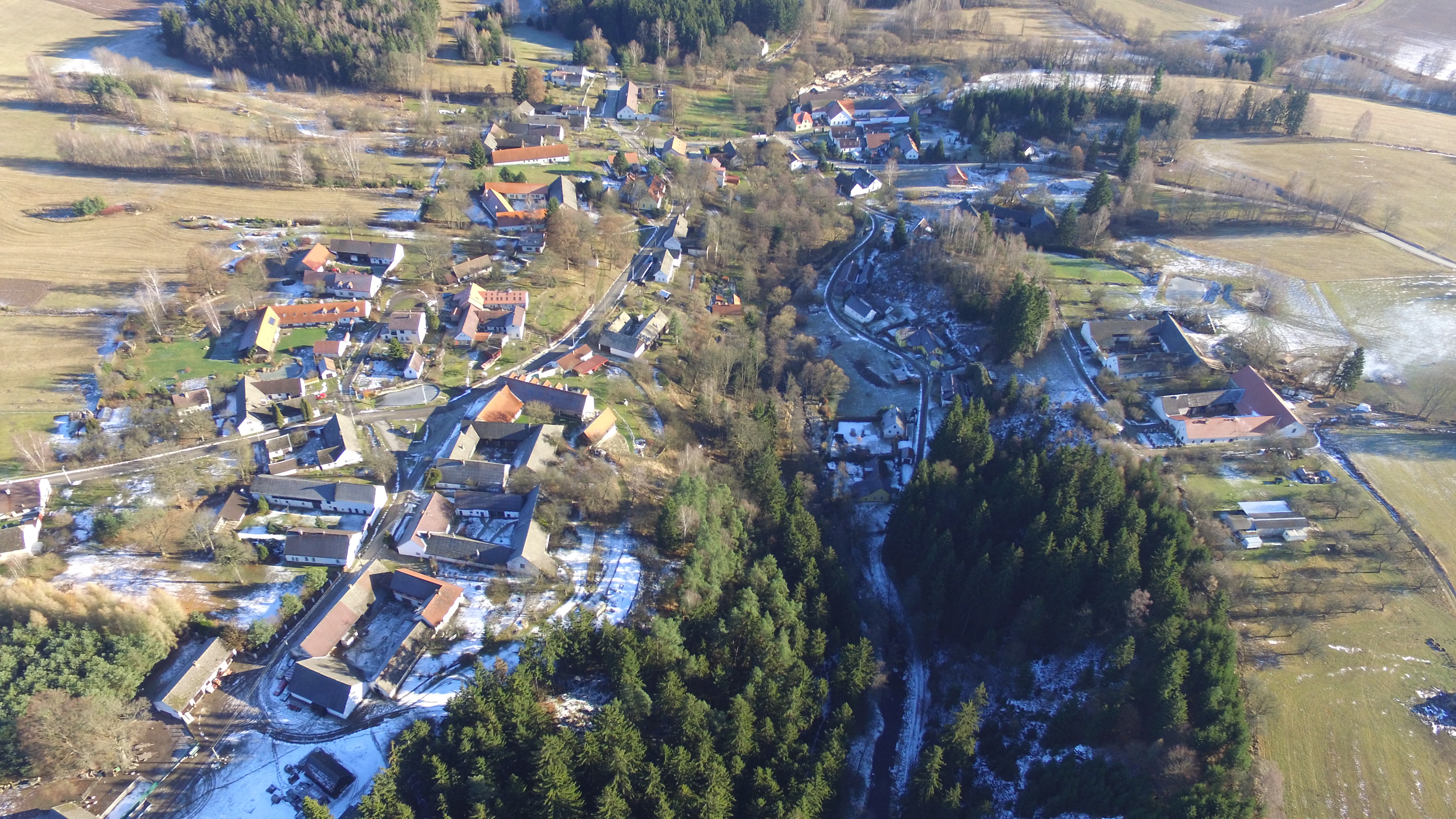 Kamenný Malíkov D02